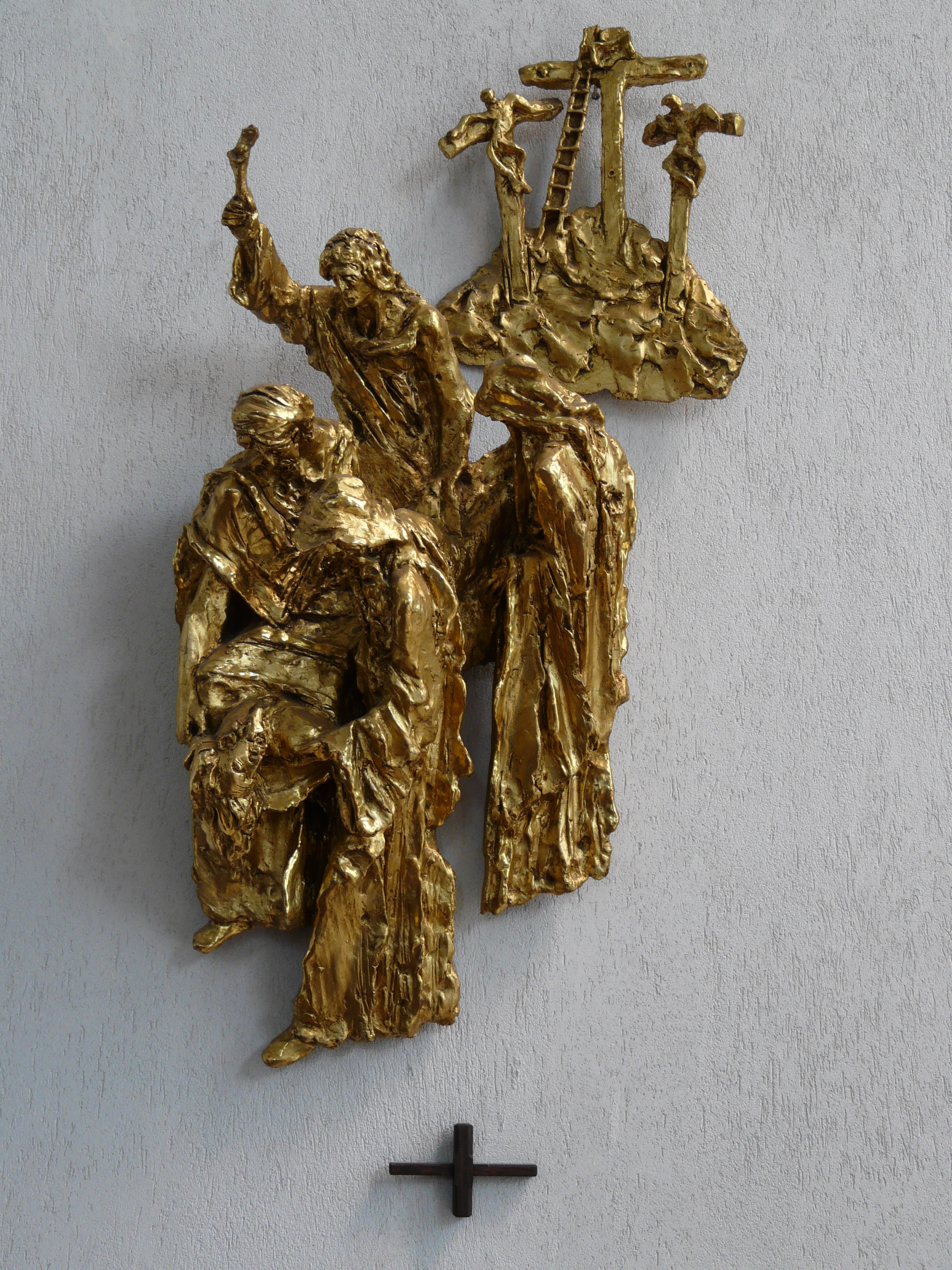 Křížová cesta v kostele sv. Václava v Břeclavi.